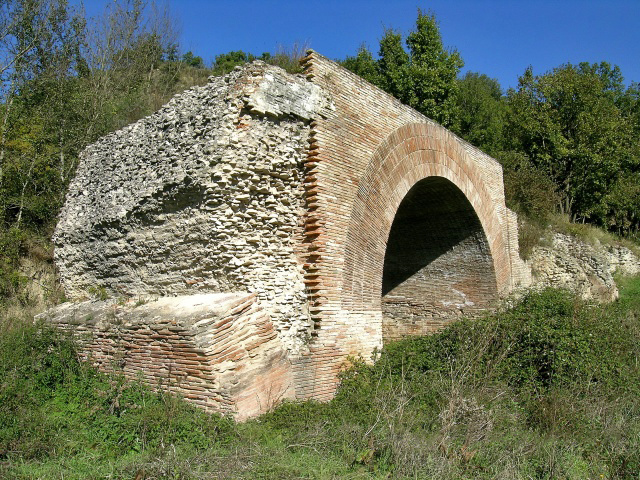 Un'arcata del ponte romano detto "delle chianche", lungo la Via Traiana nei pressi dell'abitato di Buonalbergo (BN).